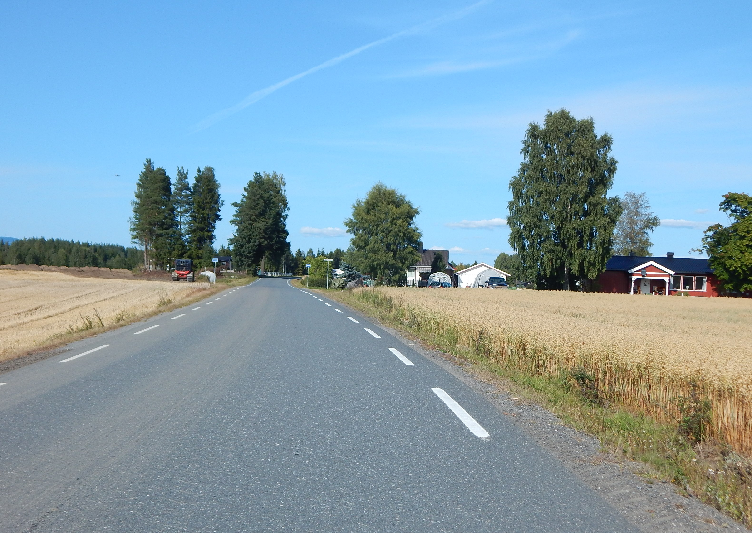 Mogreinavegen (fylkesvei 462)